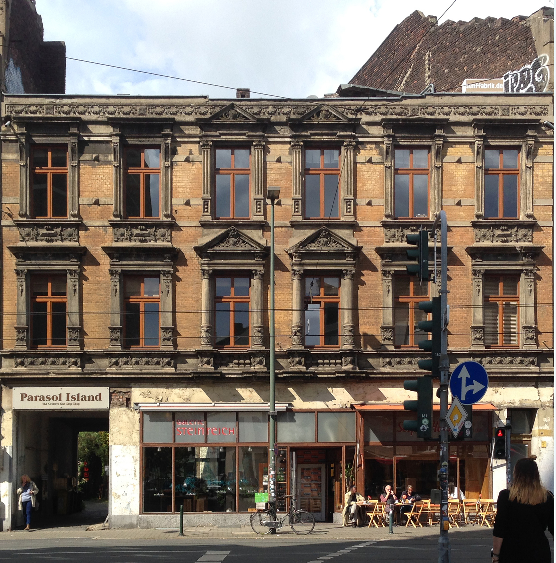 Neusser Straße 125 (Alte Senffabrik um 1912 des „aechten Düsseldorfer Mustert“ „ABB“) mit Kneipe "Seifenhorst" im Stil der Drogerie gehalten, die in den 1950er Jahren dort eröffnet wurde